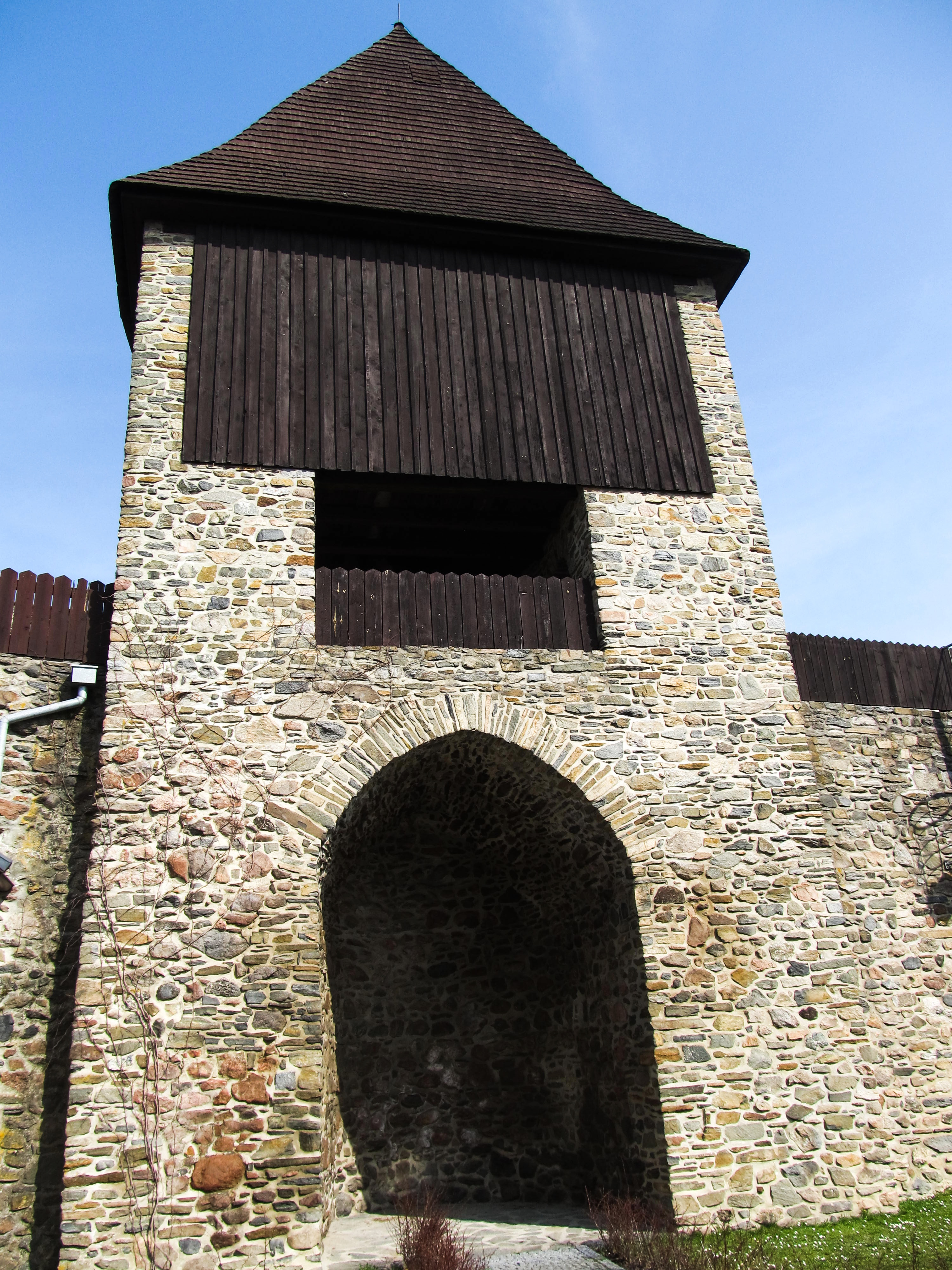 Jedna z dochovaných bašt městských hradeb.